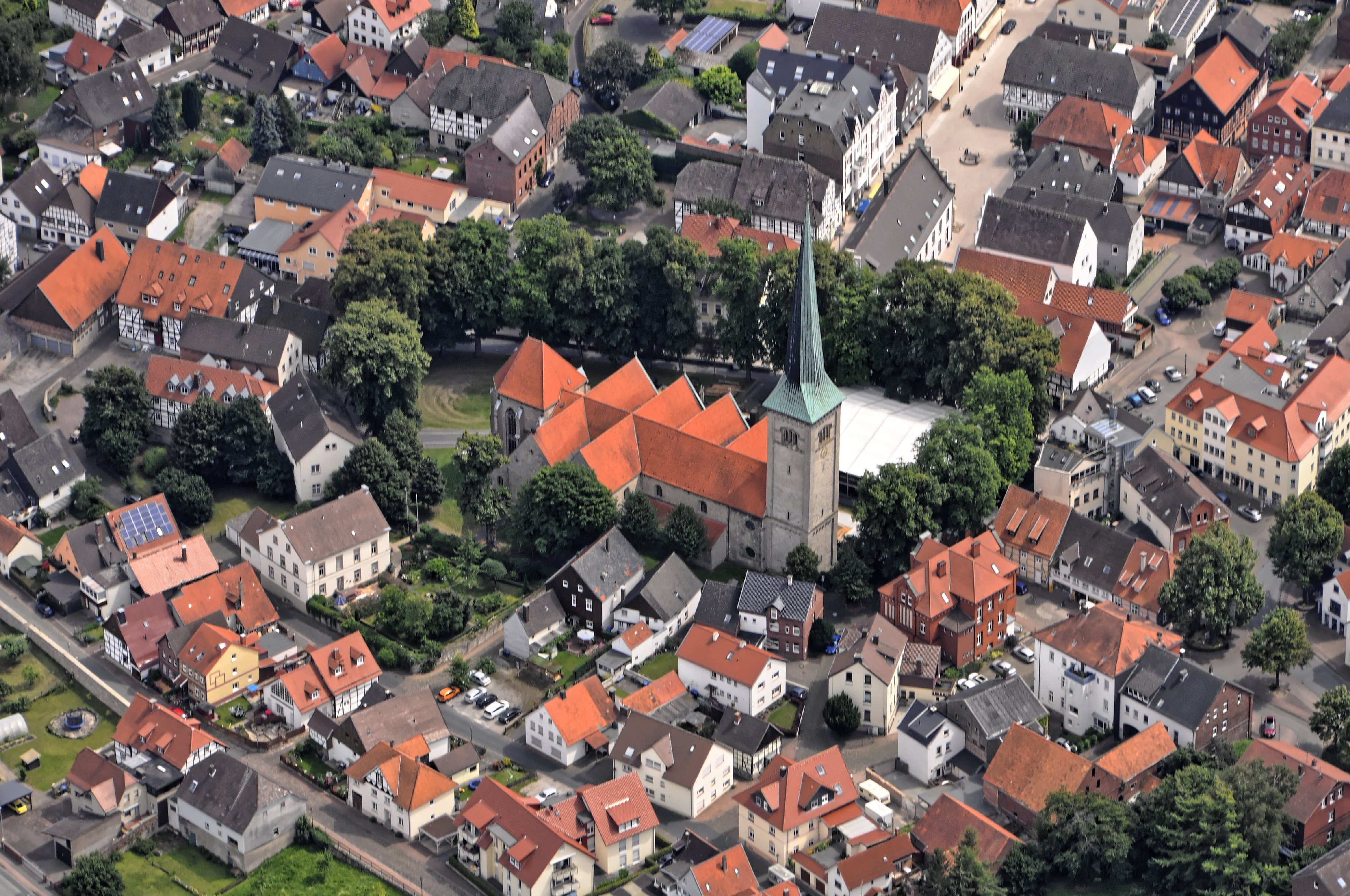 Bilder vom Flug Nordholz-Hammelburg 2015: Brakel, kath. Pfarrkirche St. Michael